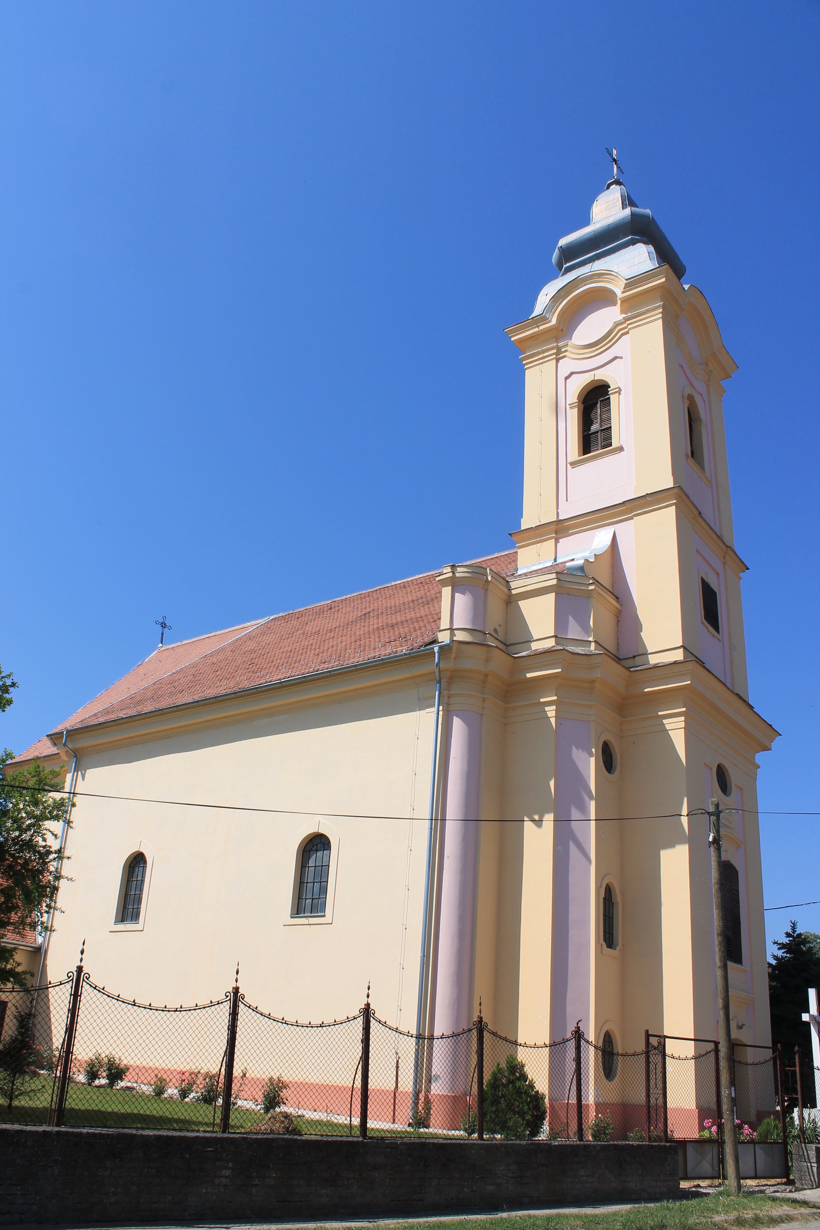 Rimokatolička crkva Sv. Josipa, Čerević